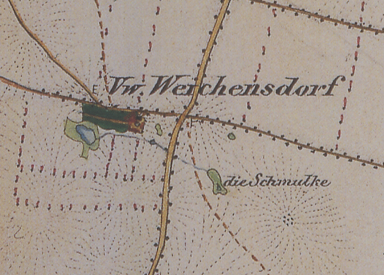 Weichensdorf, Ortsteil der Stadt Friedland, Landkreis Oder-Spree, Brandenburg, Ausschnitt aus dem Urmesstischblatt 3952 Groß Muckrow von 1844